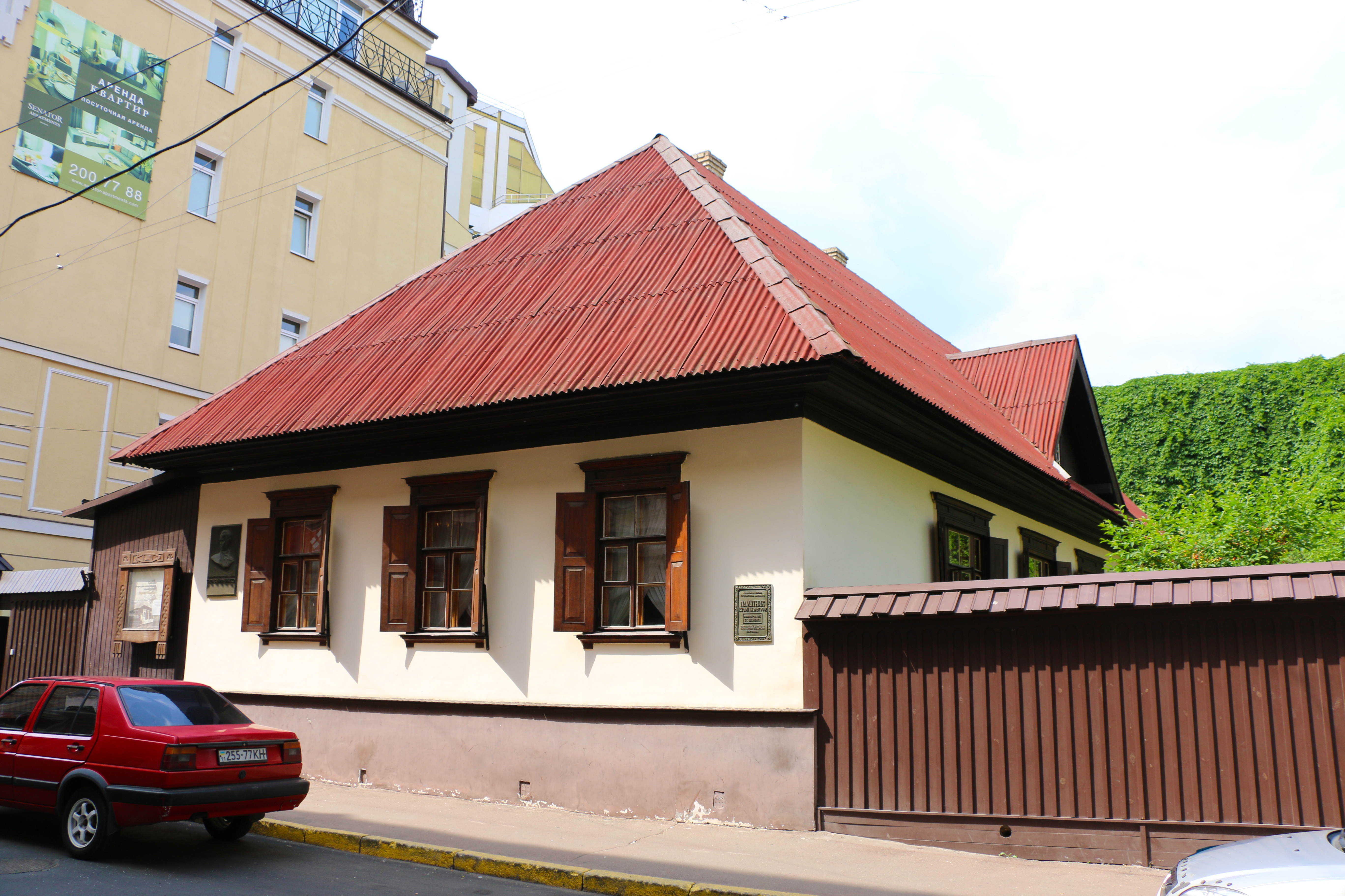 Будинок-музей літературно-меморіальний, в якому у 1846 р. мешкав Т. Г. Шевченко, поет, класик української літератури; проживали: Афанасьєф-Чужбинський О. С., письменник, історик, фольклорист; Сажин М. М., російський художник, Київ, Шевченка Тараса пров., 8-а